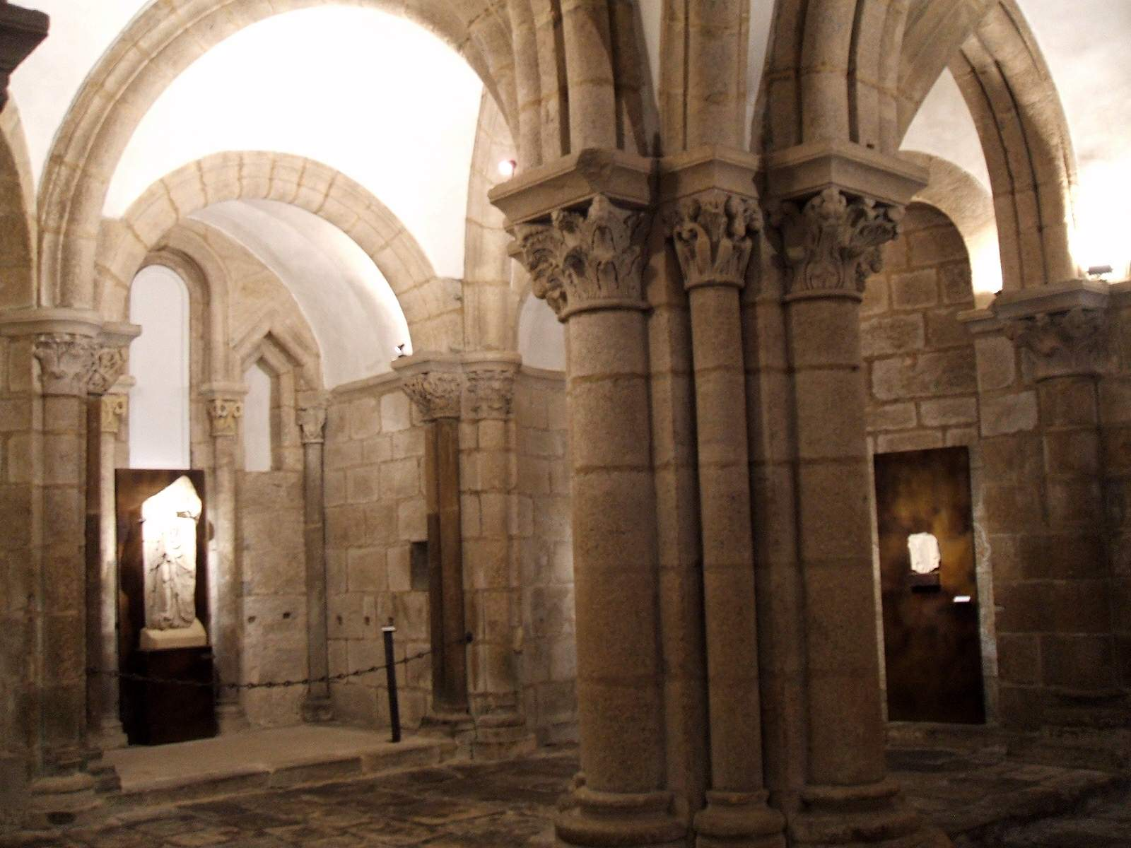 Santiago de Compostela - Catedral